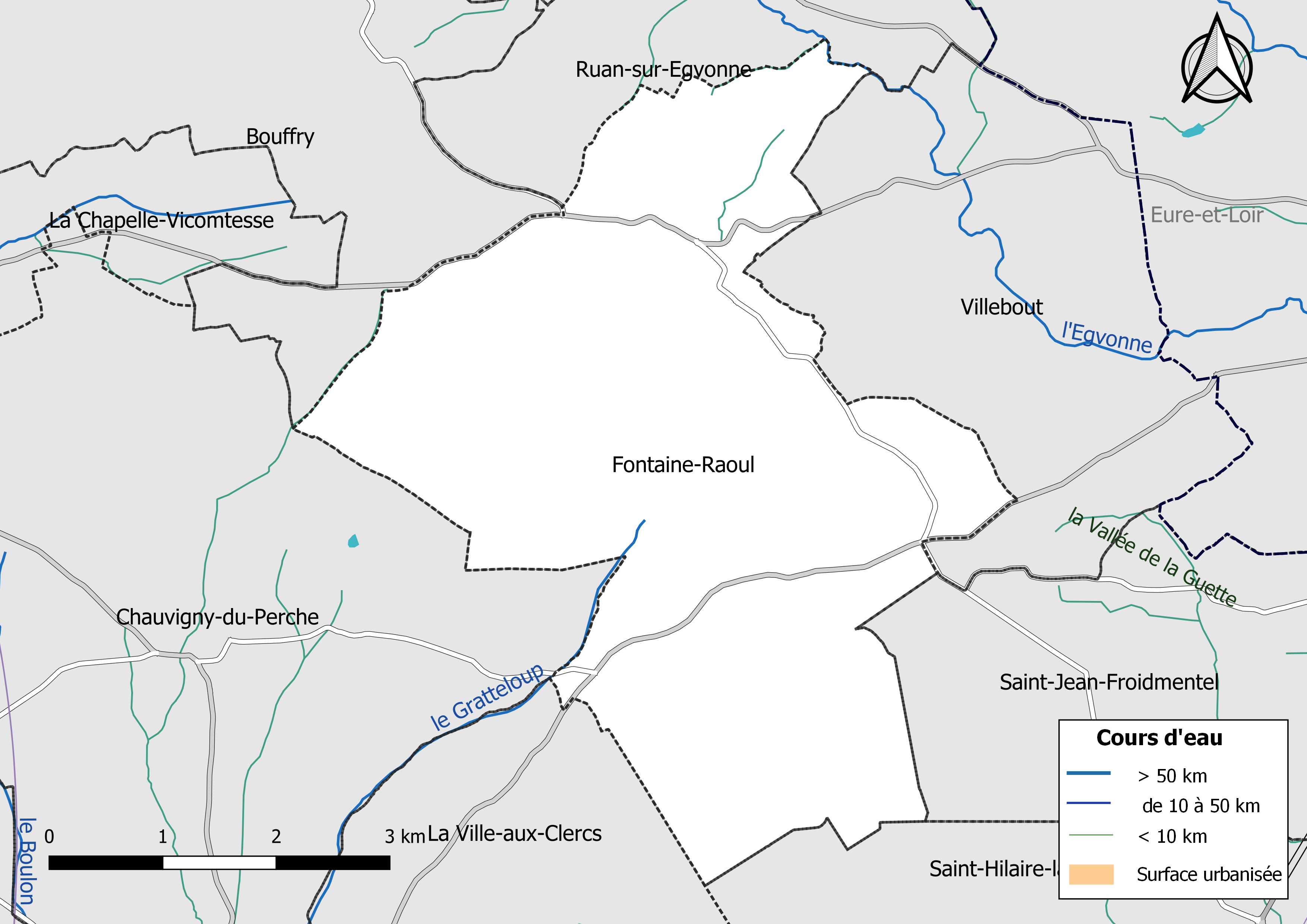 Carte du réseau hydrographique de la commune de Fontaine-Raoul (Loir-et-Cher, France).